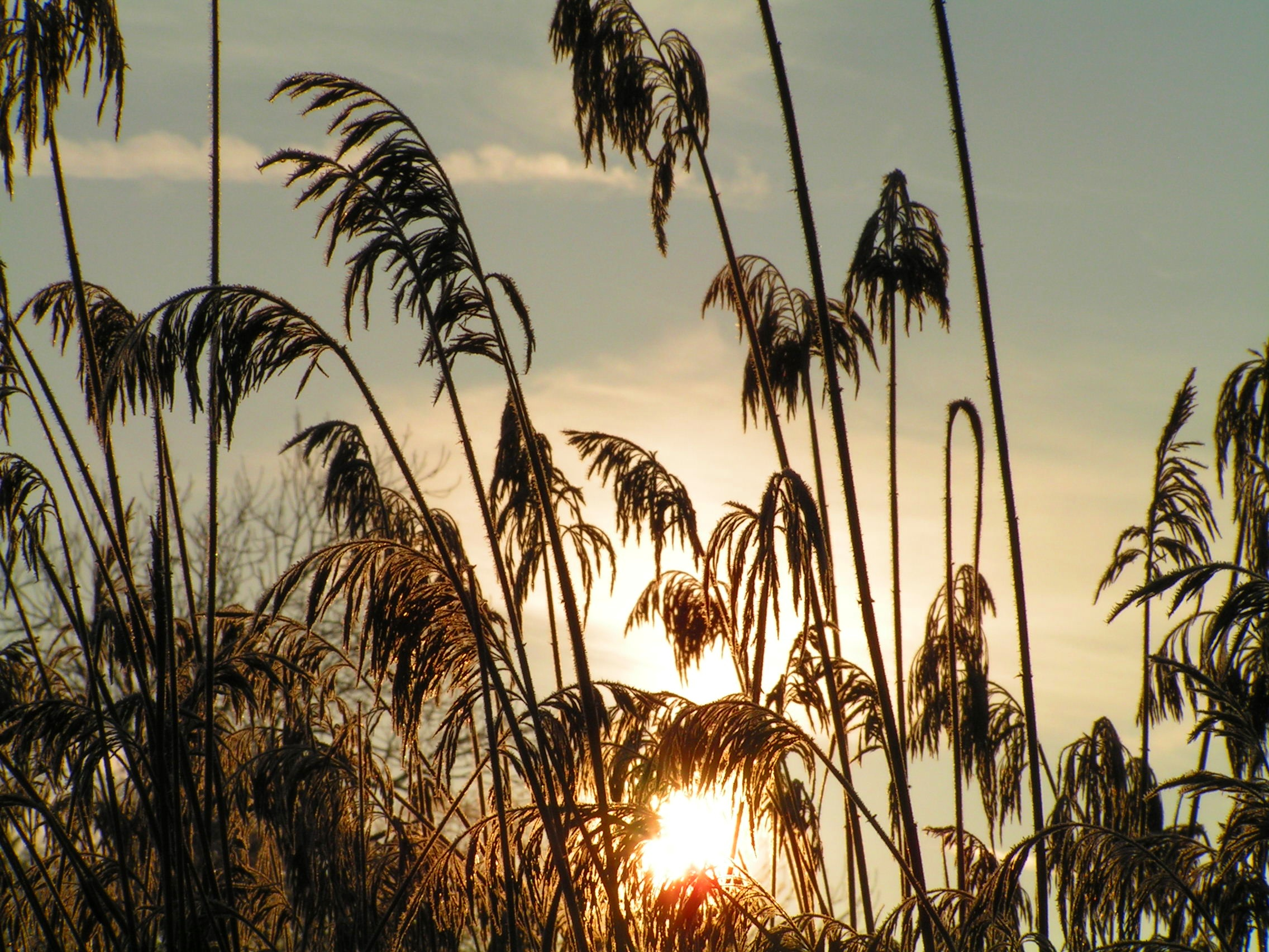 Sonnenaufgang mit Schilf im Winter